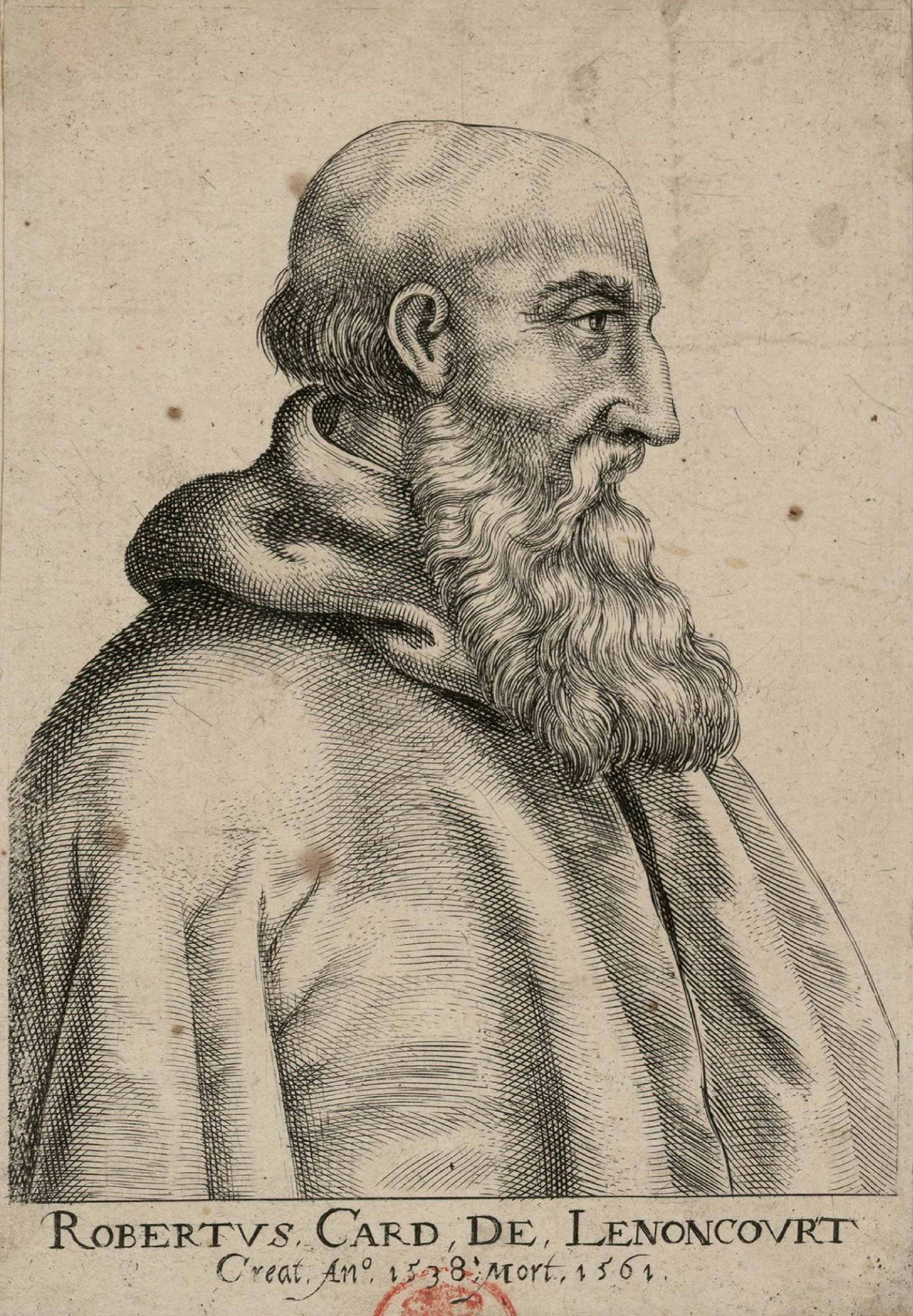 Stich mit dem Porträt dem französischen Kardinal Robert de Lénoncourt